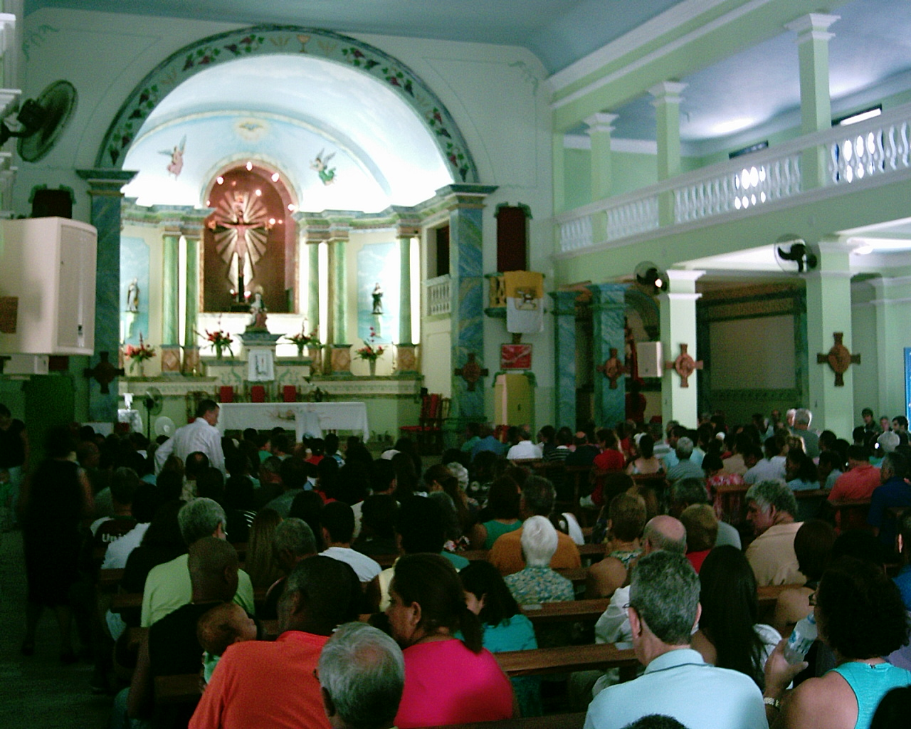 Foto interna Satuário Bom Jesus de Matozinhos